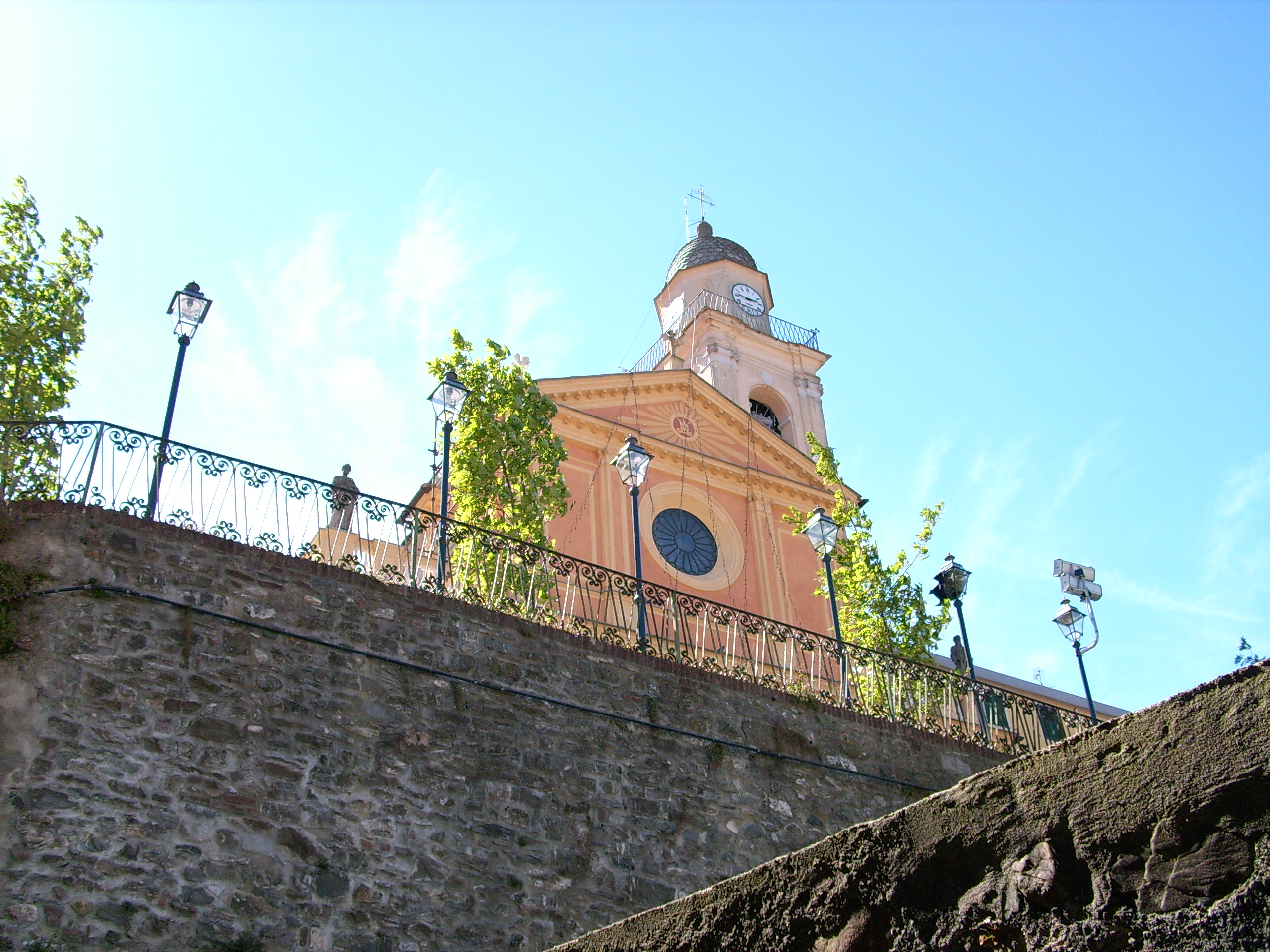 Chiesa di san Giorgio di Busalla, Liguria, Italia